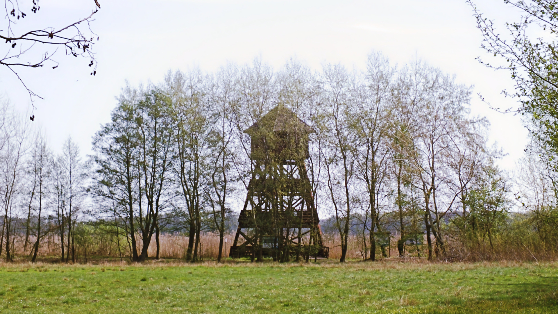 Grabownica, wieża obserwacyjna na stawie Grabownica, tzw. Wieża Ptaków Niebieskich